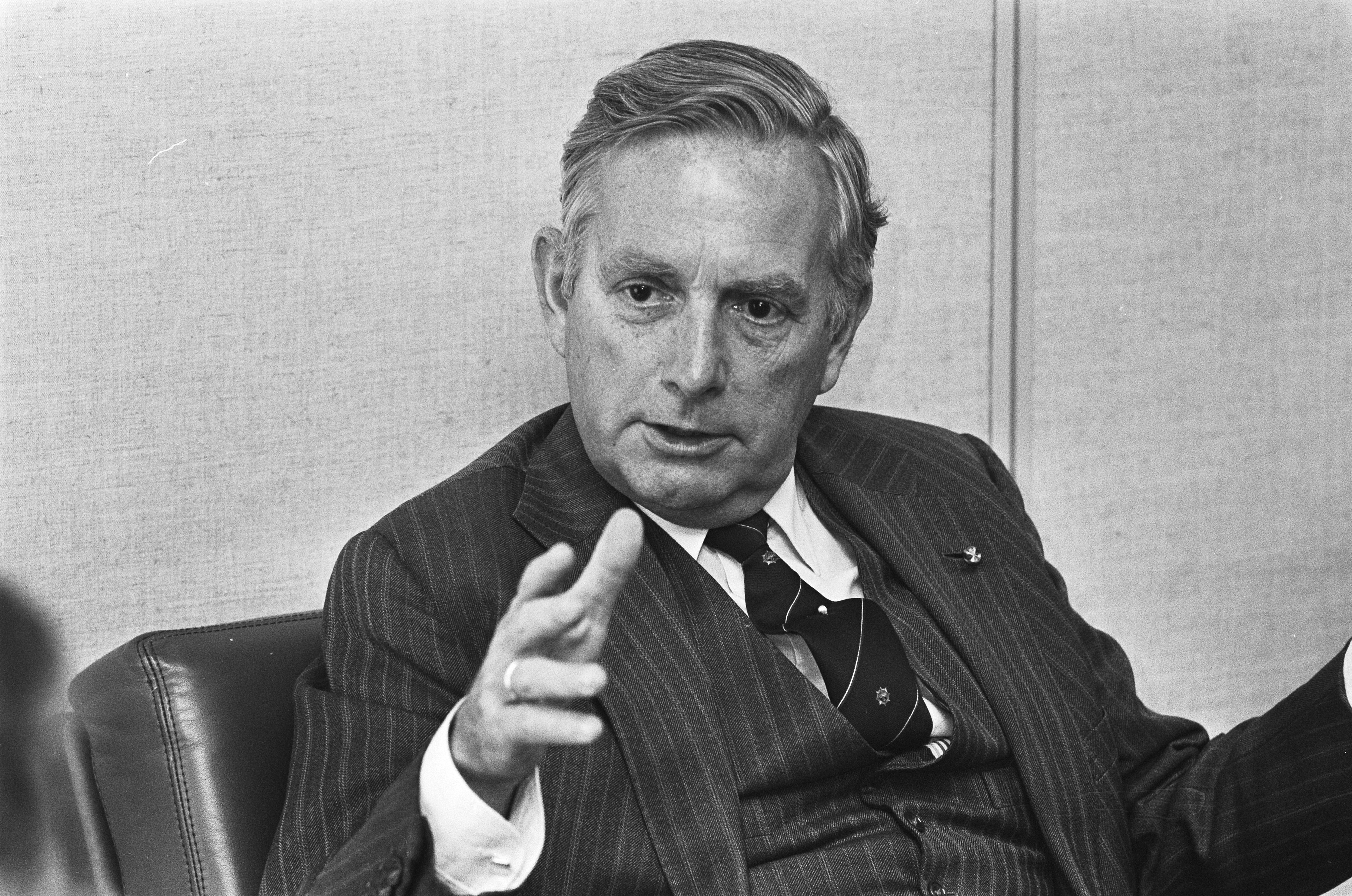 Collectie / Archief : Fotocollectie Anefo Reportage / Serie : [ onbekend ] Beschrijving : Opdracht Financieel Dagblad , minister Korthals Altes Datum : 4 september 1985 Trefwoorden : ministers Persoonsnaam : Korthals, Benk Instellingsnaam : Financieel Dagblad Fotograaf : Croes, Rob C. / Anefo Auteursrechthebbende : Nationaal Archief Materiaalsoort : Negatief (zwart/wit) Nummer archiefinventaris : bekijk toegang 2.24.01.05 Bestanddeelnummer : 933-4122